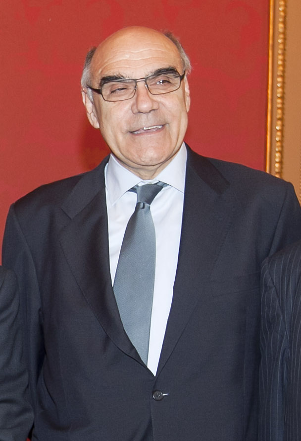 Salvador Alemany, presidente de Abertis, en la entrega del Premio Llotja 2010 a Repsol YPF, 23 de mayo de 2011